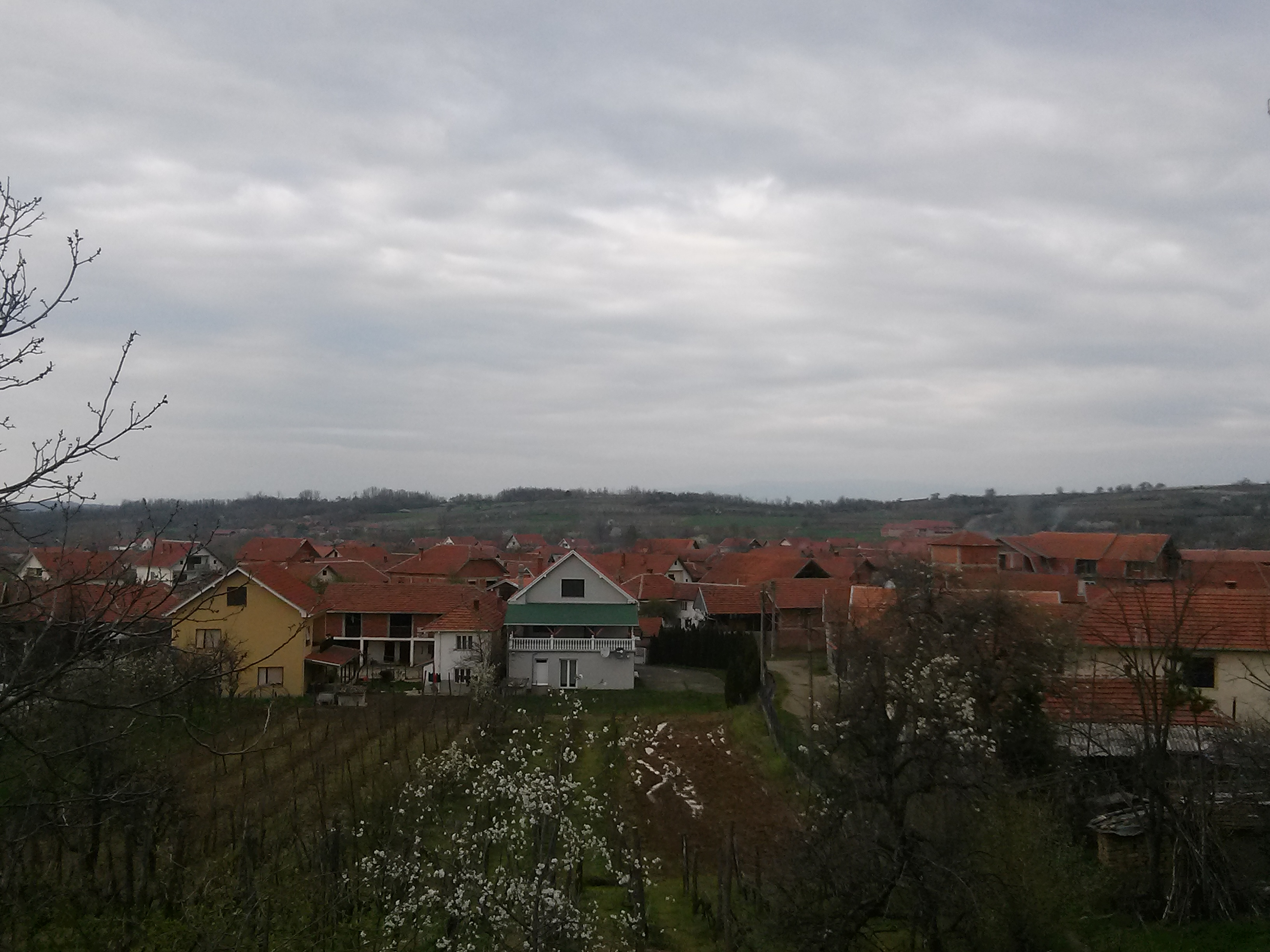 Srpski (latinica): Nakrivanj, Leskovac